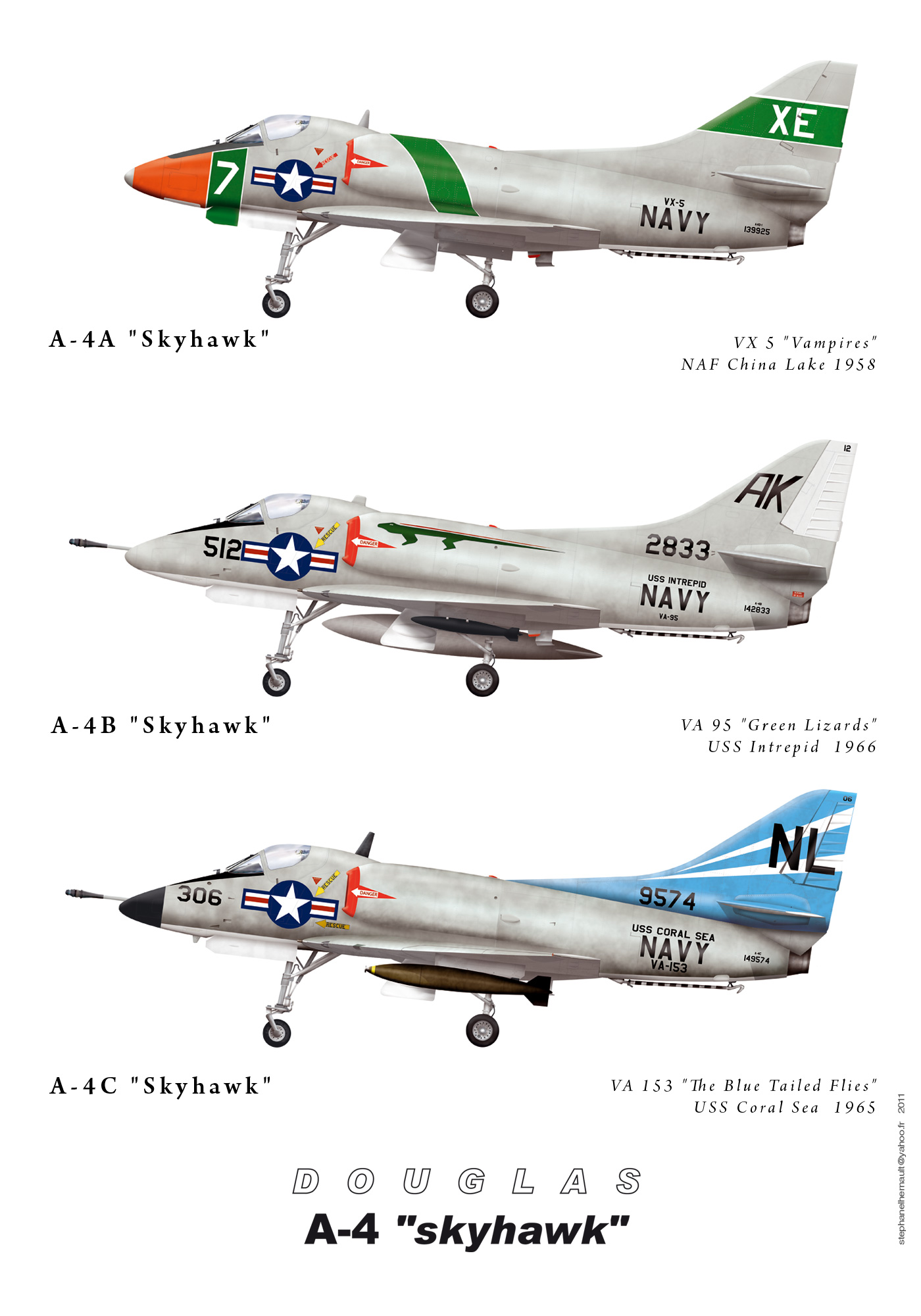 A-4 skyhawk version A/B/C